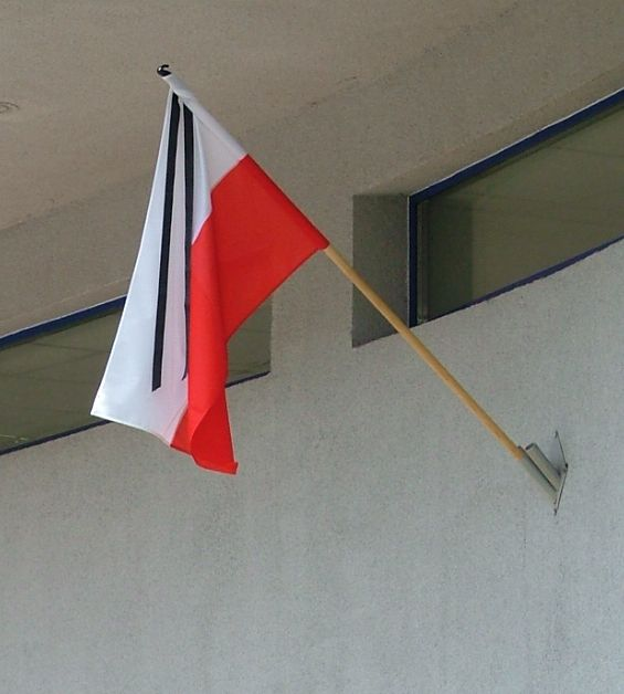 Flagi na Urzędzie Dzielnicy Praga Południe, Warszawa